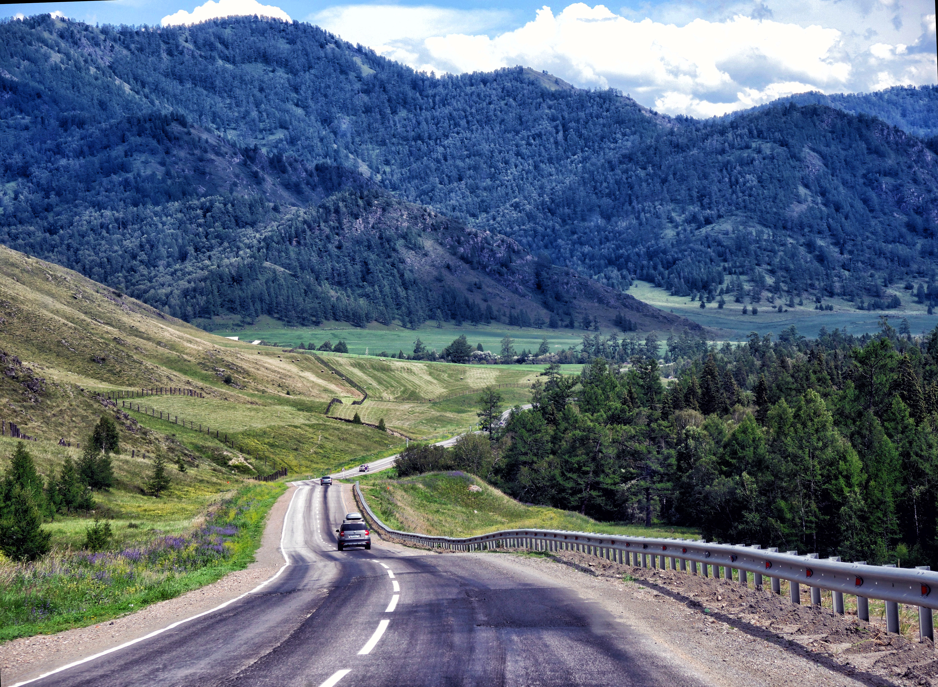 Перевал Семинский: В 10 км к югу от с. Топучая, в осевой зоне Семинского хребта.,Онгудайский район, Алтай This image is related to the protected area of Russia number 0410020